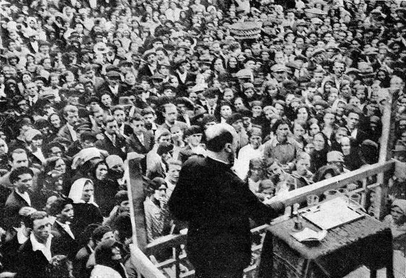 José Portal Fradejas nun mitin da Unión Regional de Derechas en 1932, fotografía de Vida Gallega